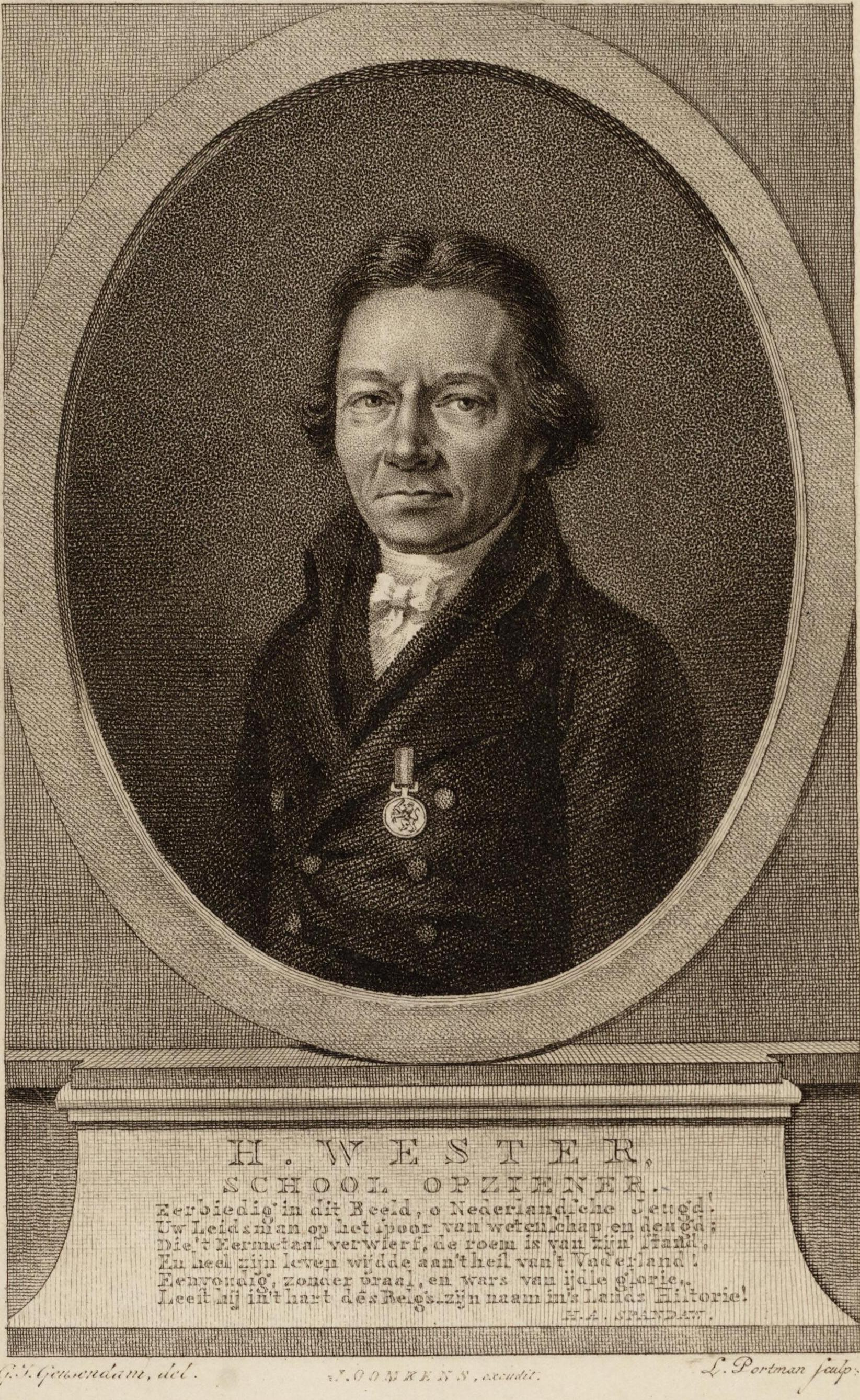 Detail van een portet van de onderwijshervormer Hendrik Wester (1752-1821)